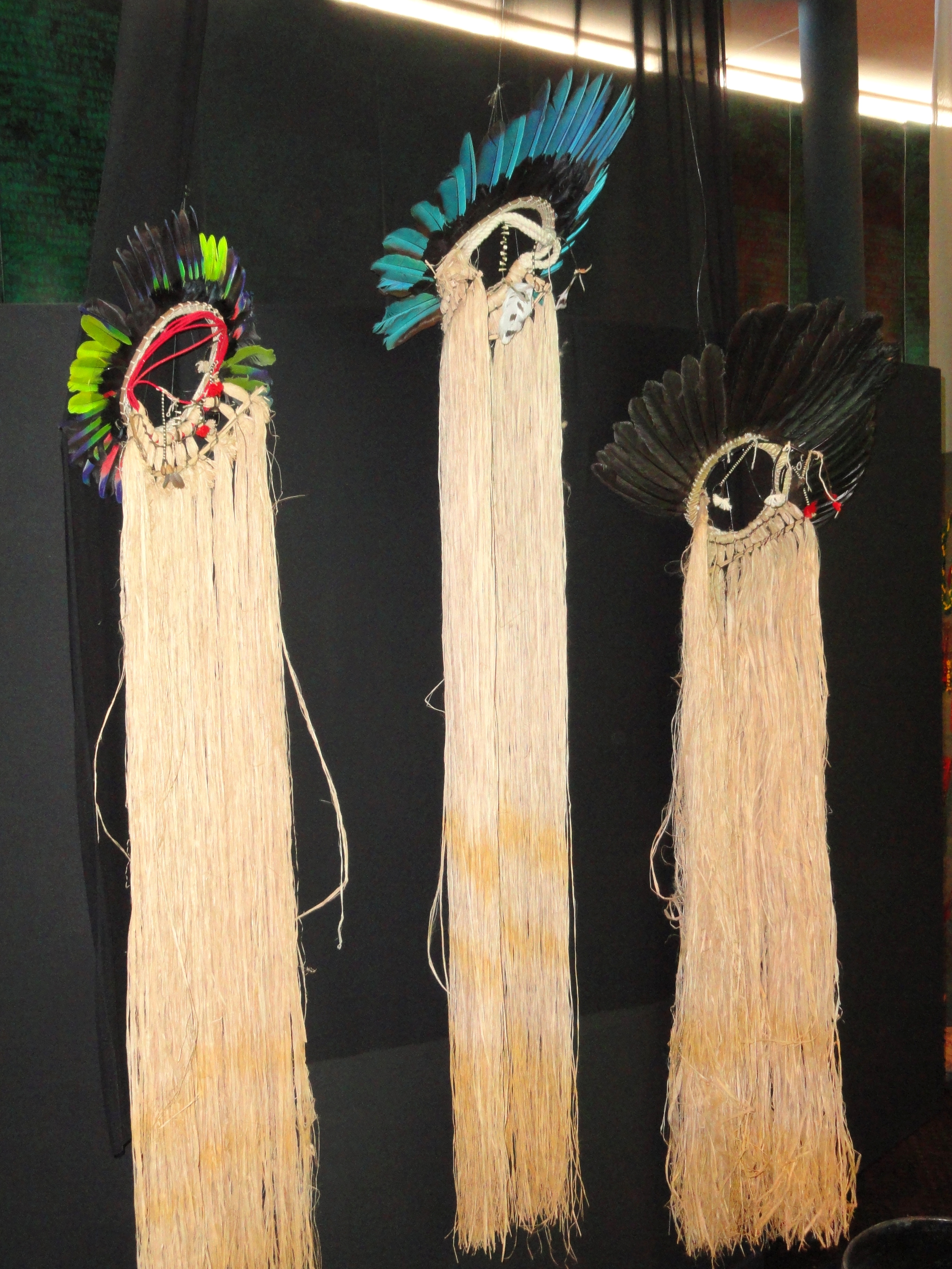 Exhibit in the Memorial dos Povos Indígenas, Brasília, Brazil.